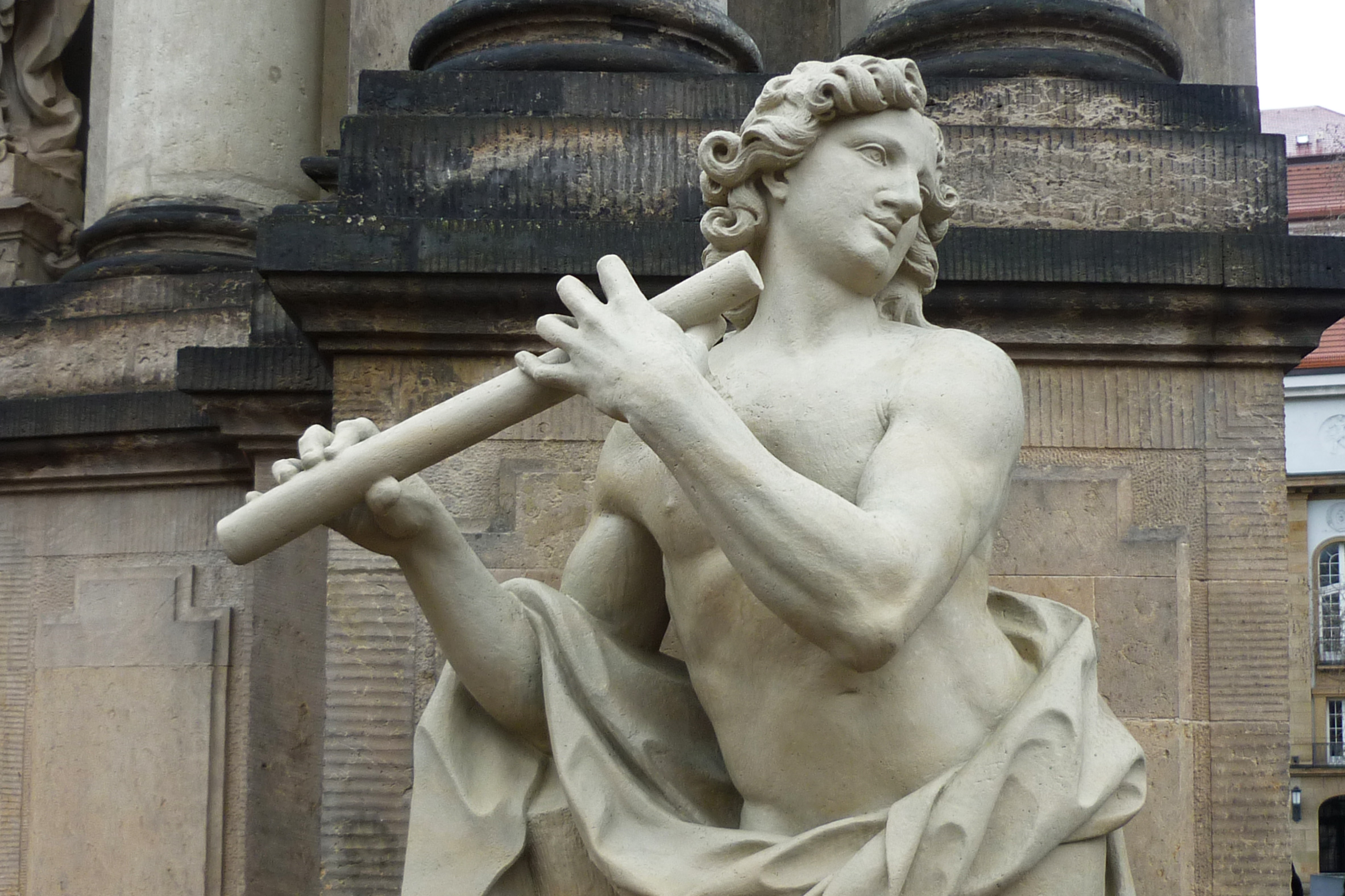 Standfigur Flötenspieler / Schalmeibläser (P48) am Kronentor (Hofseite, links) des Dresdner Zwingers (Detail)